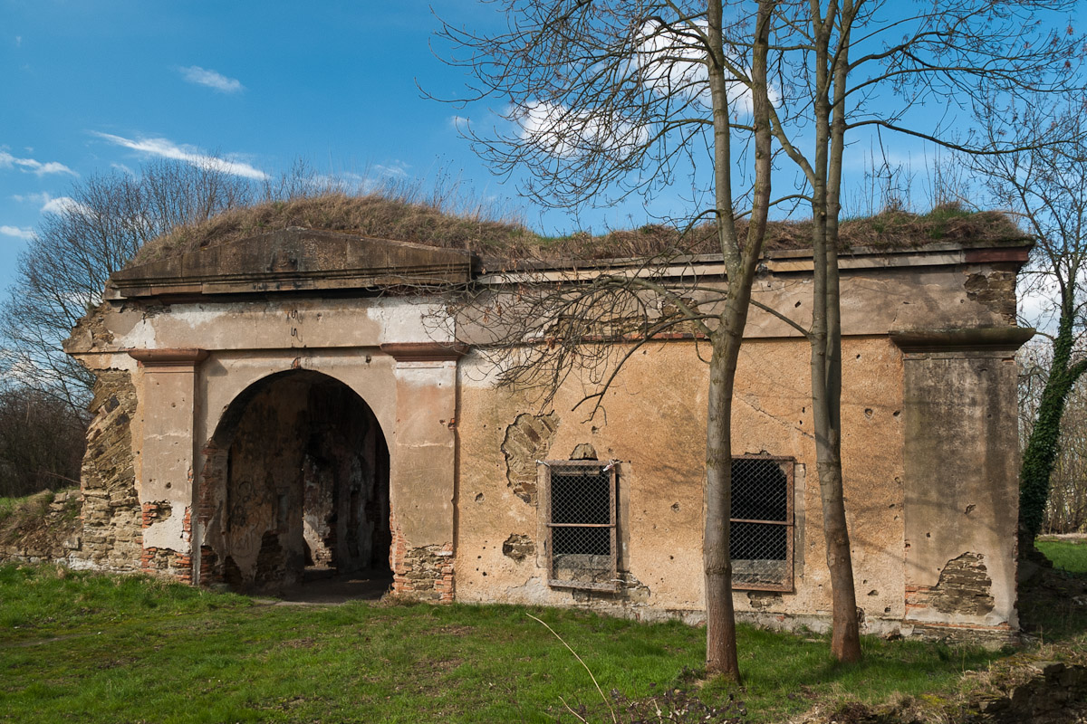 Tor zur Wallanlage des Fort Asterstein, Teil der ehemaligen "Festung Koblenz". Befindet sich in Koblenz, Stadtteil Asterstein, Rheinland-Pfalz, Deutschland